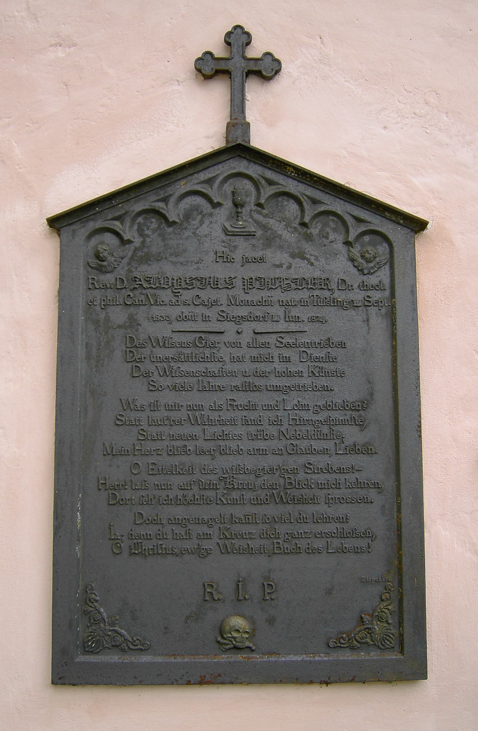 Grabplatte von Aloys Pichler, Gusseisen, Pfarrkirche Siegsdorf, nördliche Aussenwand